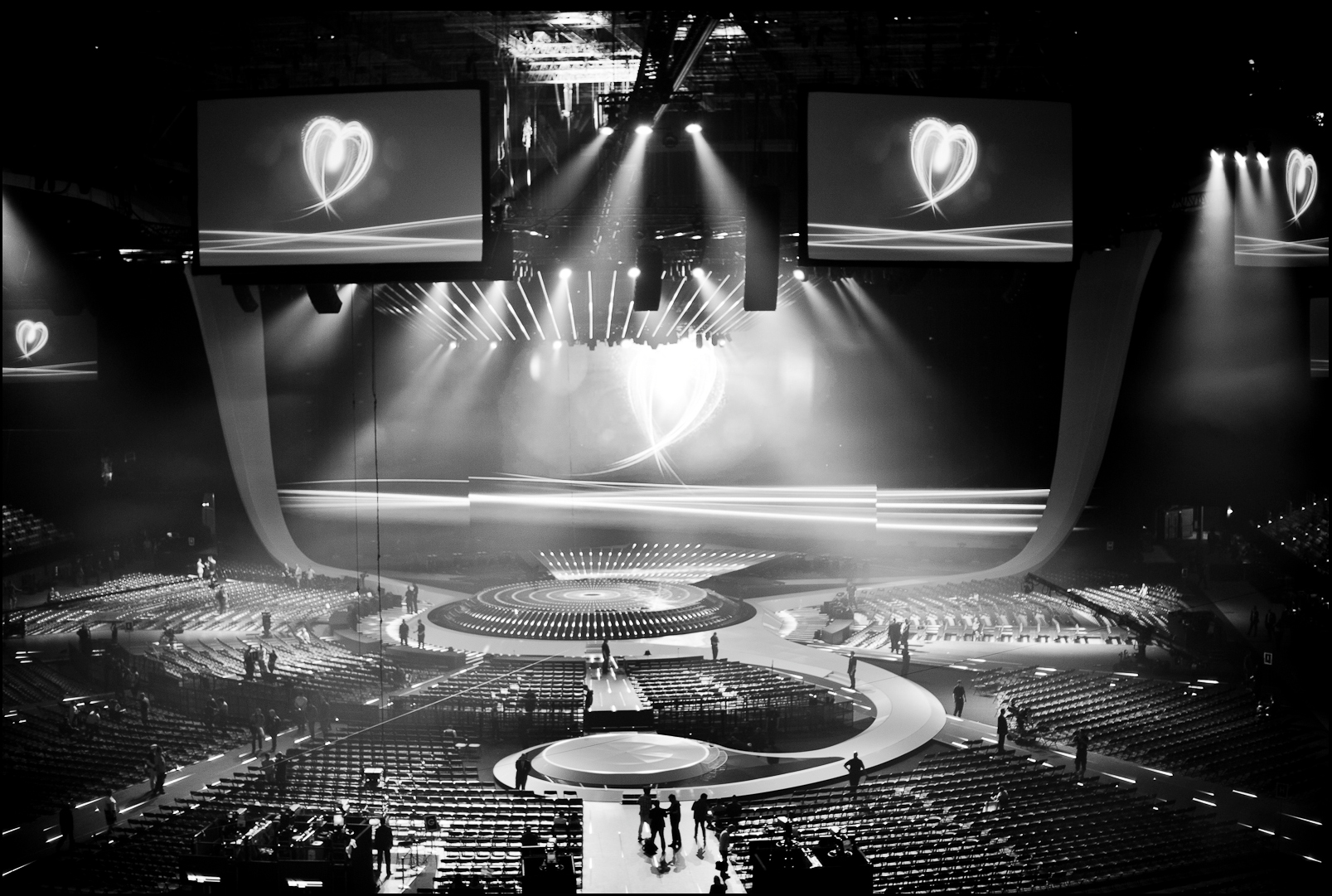 Eurovision Song Contest Dusseldorf 2011 Nikon d700, Nikkor 50 1.4g